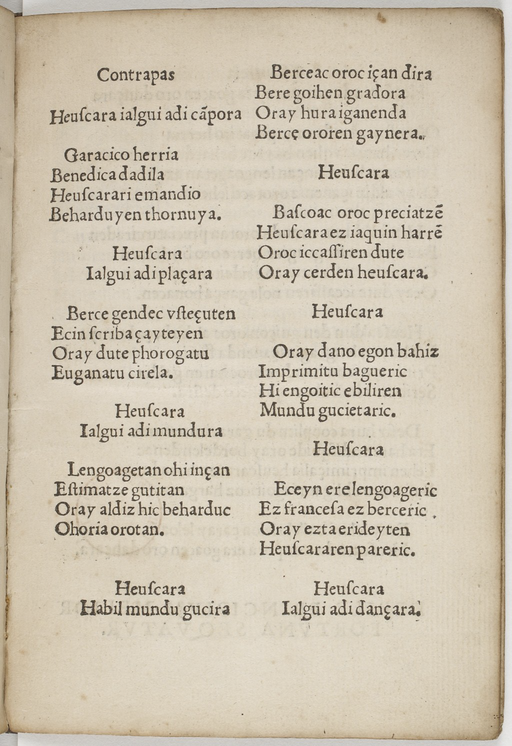 Etxepareren Kontrapas olerkia